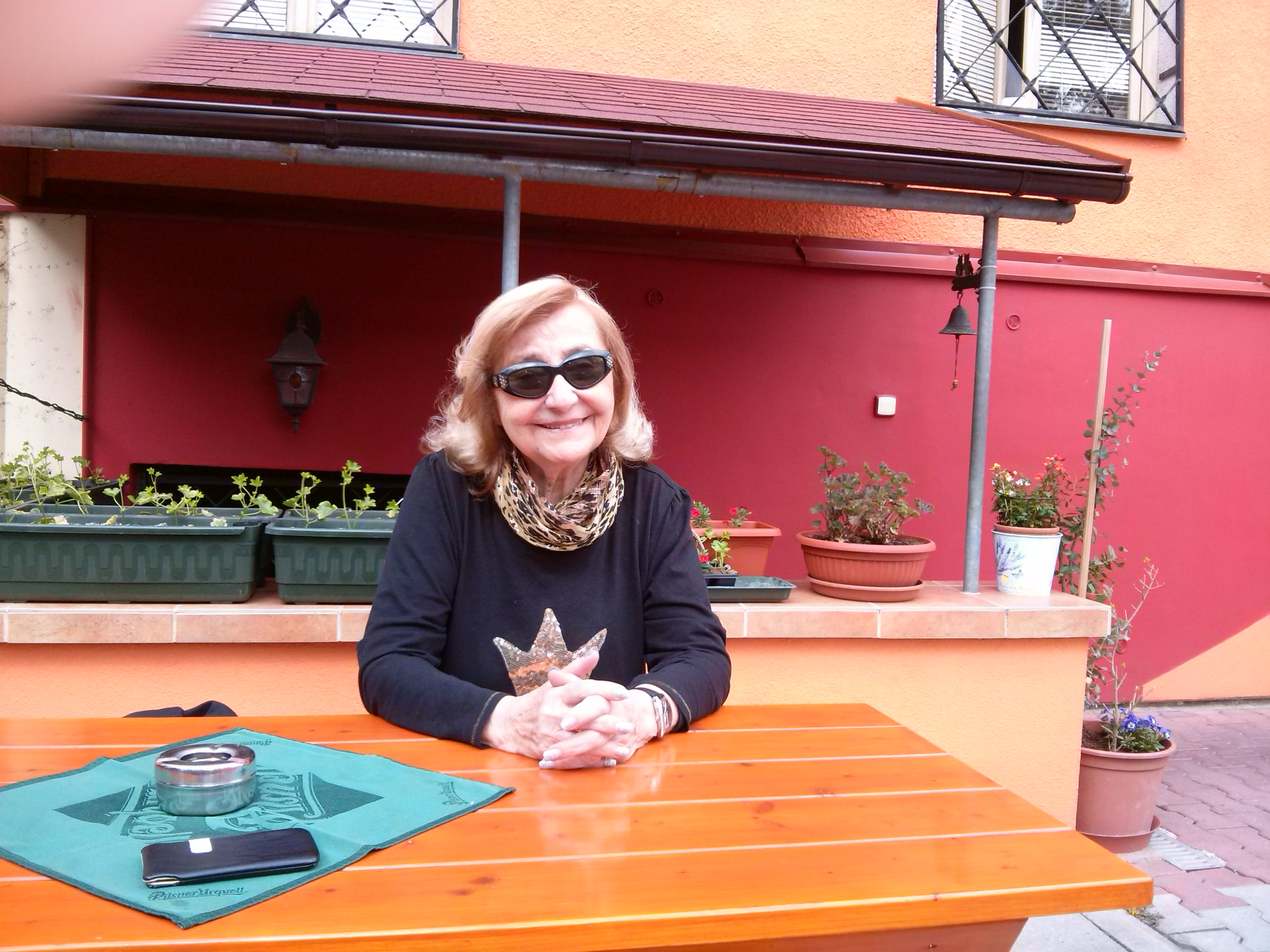 Zorka Kohoutová (2015)